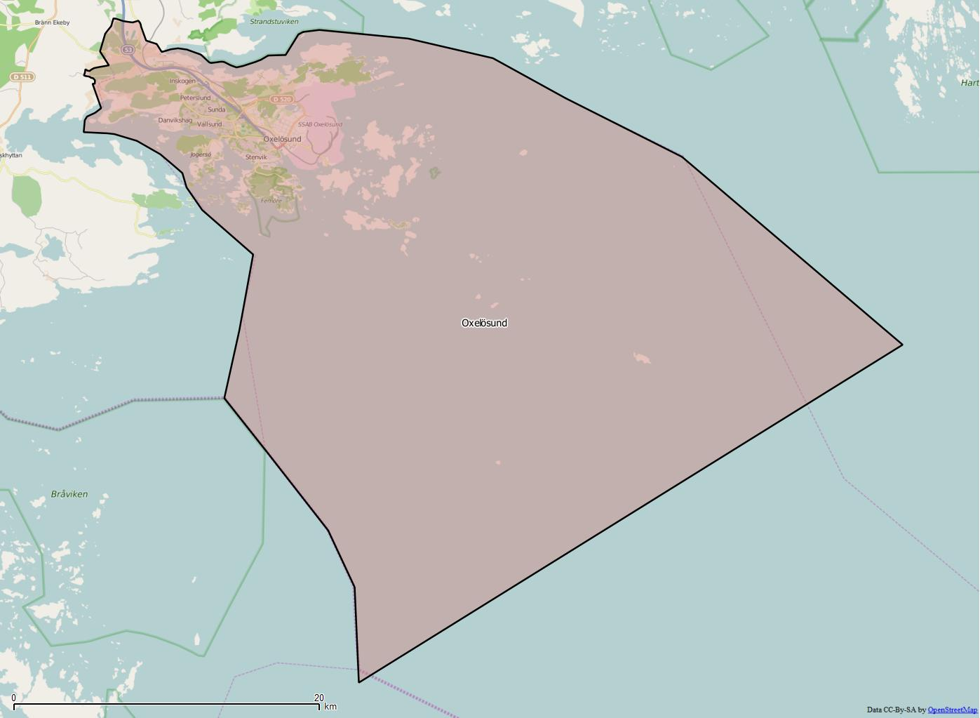 Distriktsindelningen i Oxelösunds kommun World file: 45.95302653003334825 0 0 -45.95302653003334825 1885531.7242305891122669 8118478.16006300318986177